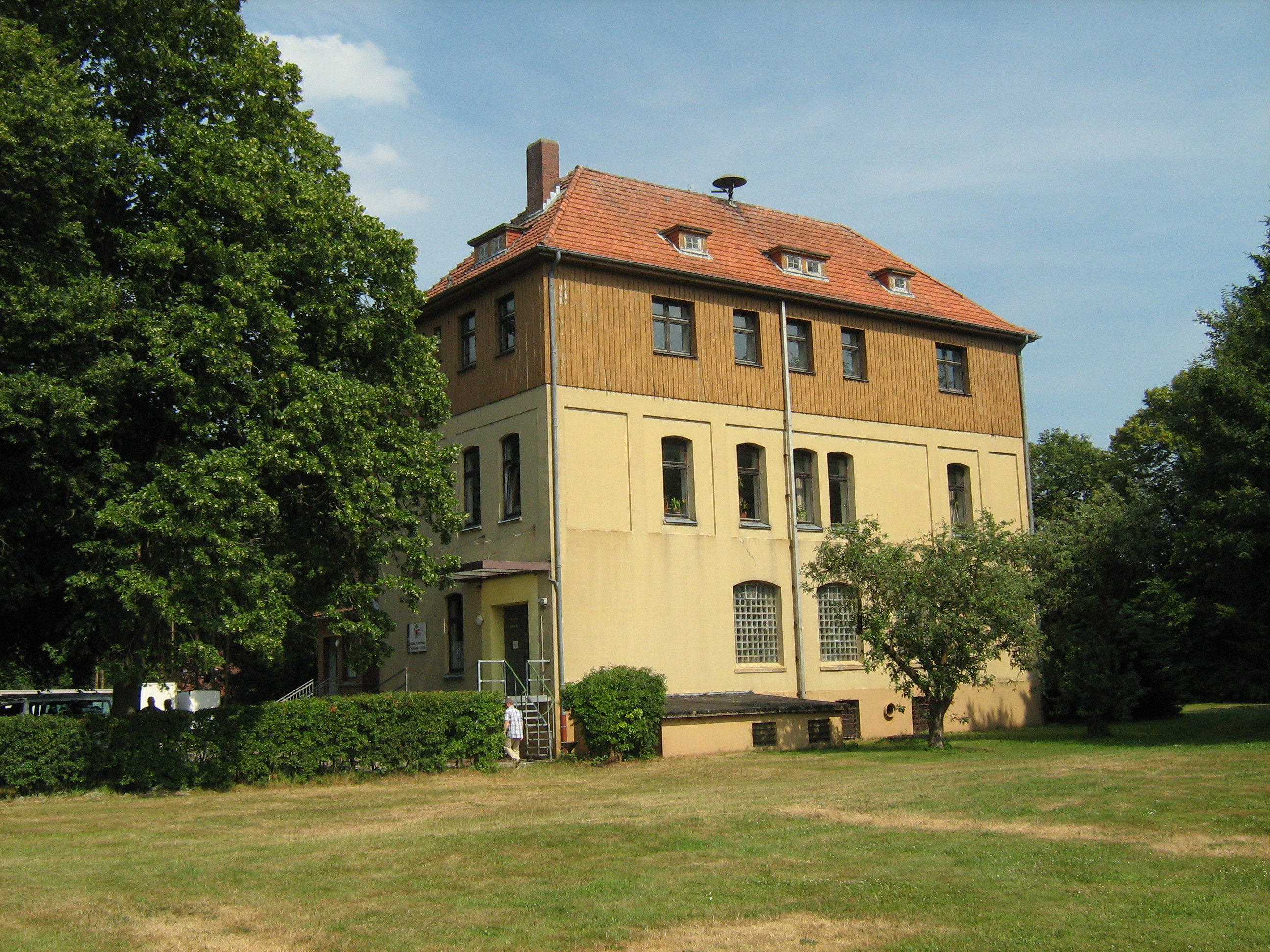 Freistatt- Haus Moorburg im Jahr 2010 (Arestzelle ist noch erhalten)